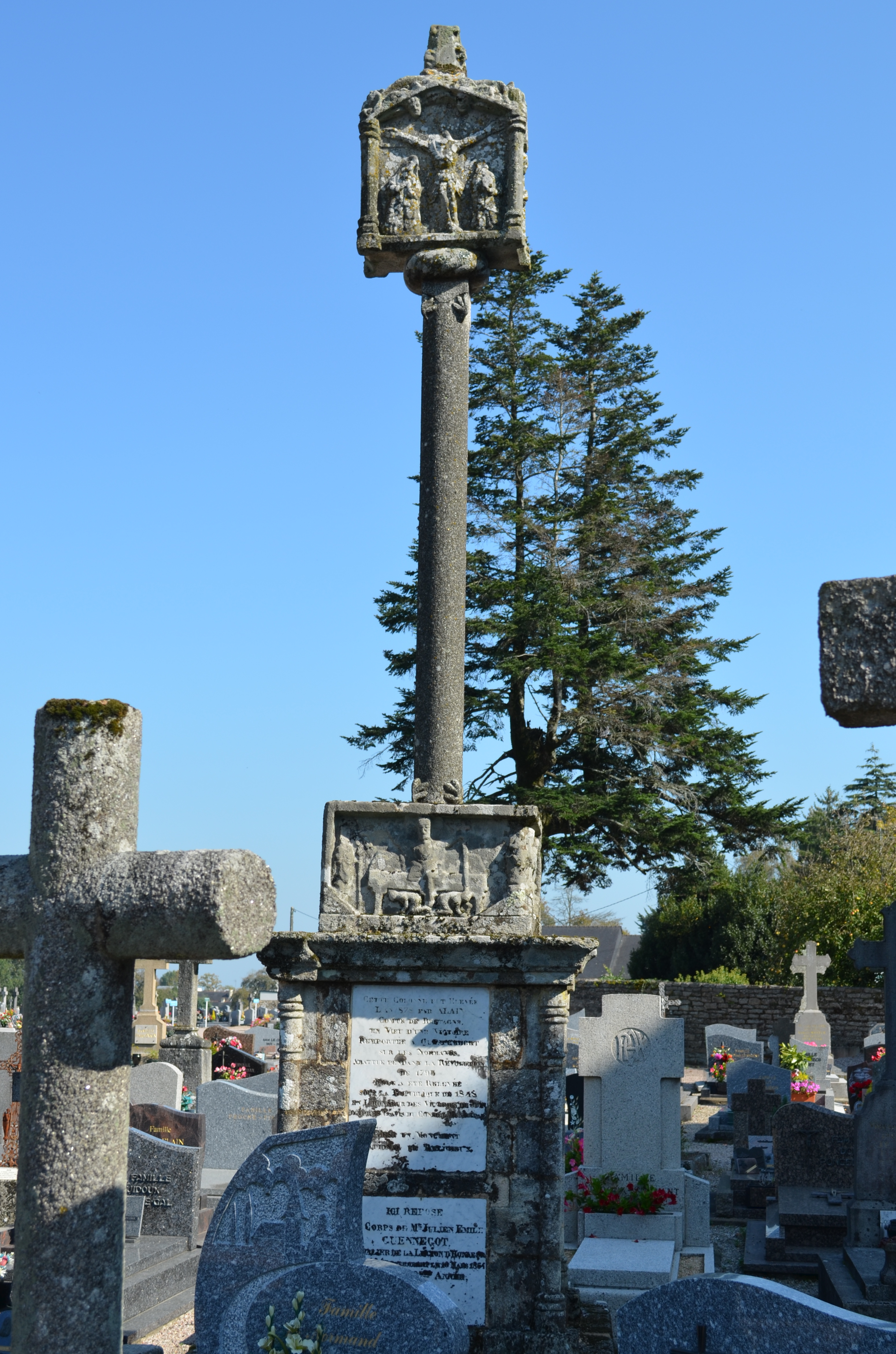 Croix de cimetière 16e s. - Questembert (Morbihan) .